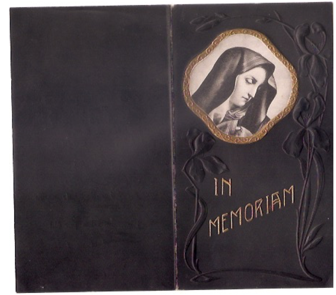 Parte externa del memorial de don Félix Cuevas González para sus misas al mes de su fallecimiento